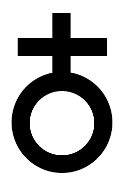 Kreuz_auf_der_Weltkugel / Logo der Arbeitsgemeinschaft der Evangelischen Jugend in Deutschland e.V., eingeführt von Otto Riethmüller